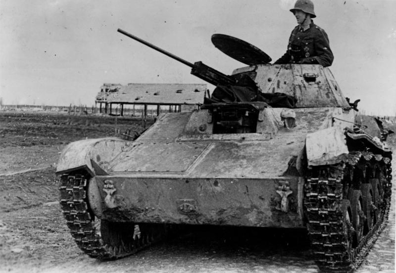 Russland, Cholm russischer Beutepanzer An der Sowjetfront: Bei der Kampfgruppe Scherer.- Erbeutete sowjetische Panzer wurden von unseren Männern wieder flottgemacht und spielten für die weitere Verteidigung der Ortschaft eine wichtige Rolle. [Sowjetunion, Cholm (?).- Deutscher Panzersoldat (?) der "Kampfgruppe Scherer" mit Stahlhelm auf Turm eines erbeuteten leichten sowjetischen Panzer T-60] Information added by Wikimedia users.